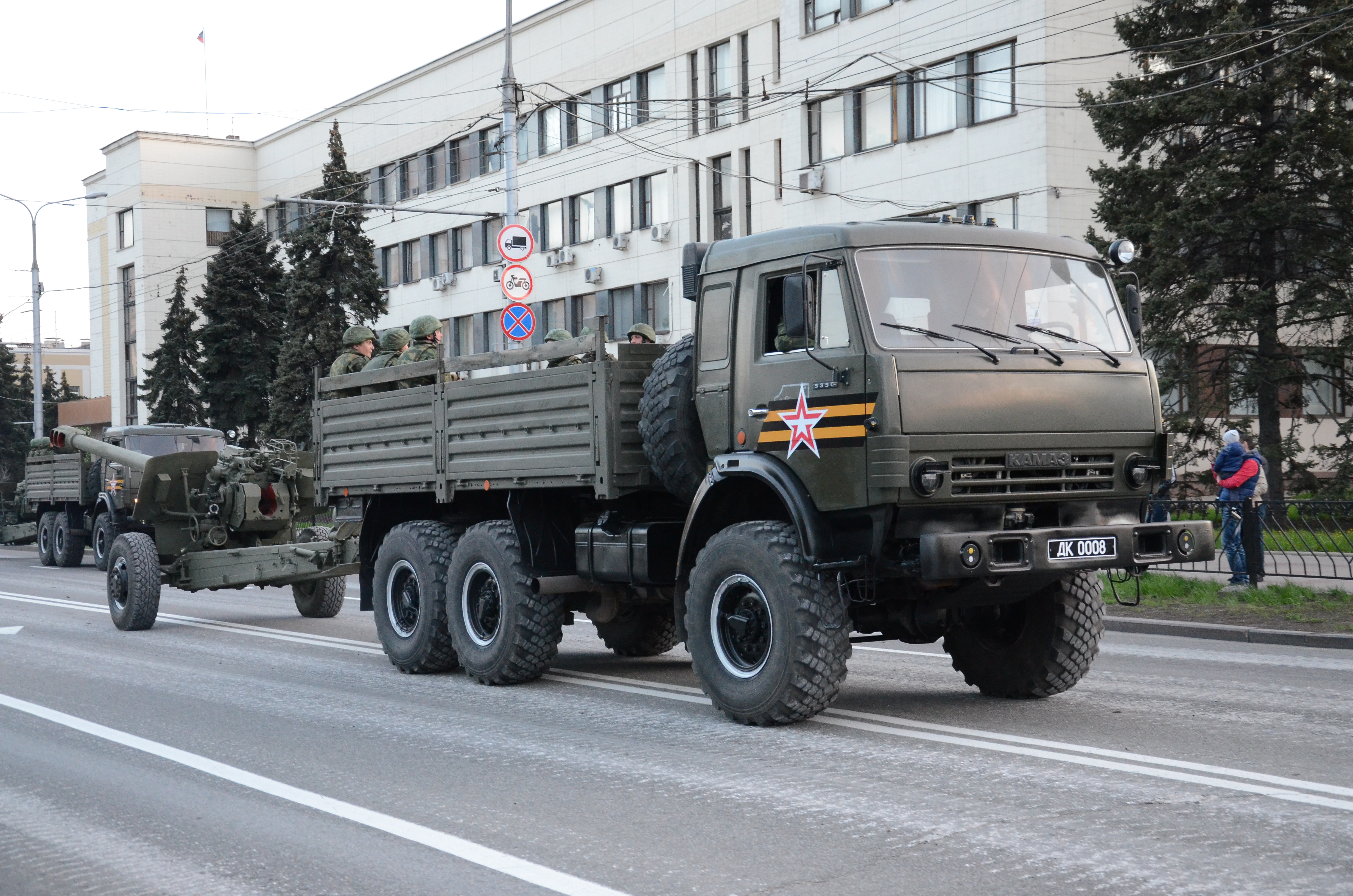 Репетиция парада в честь дня Победы в Донецке